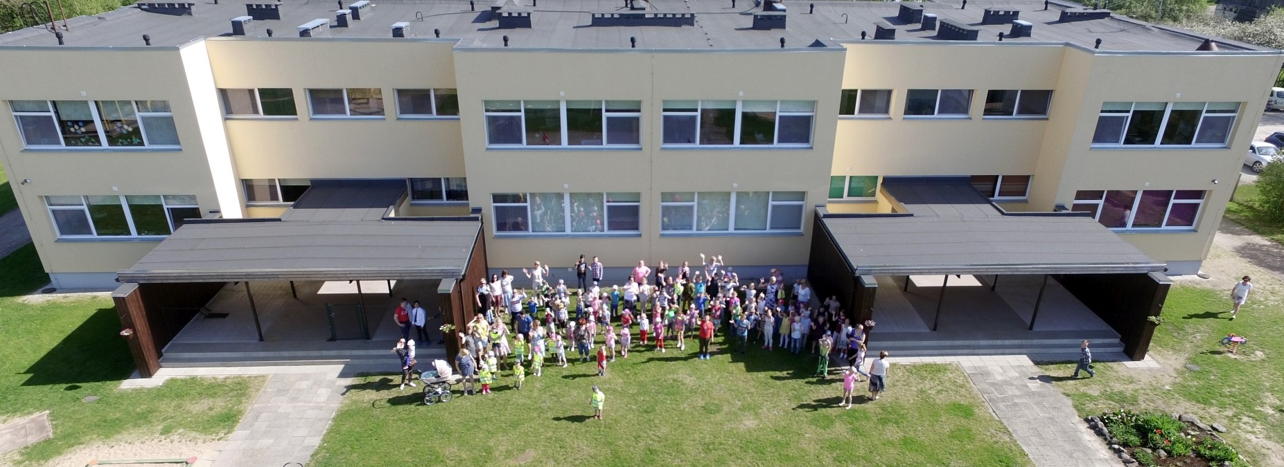 Laulasmaa Kool Lehola koolimaja, kevad 2018